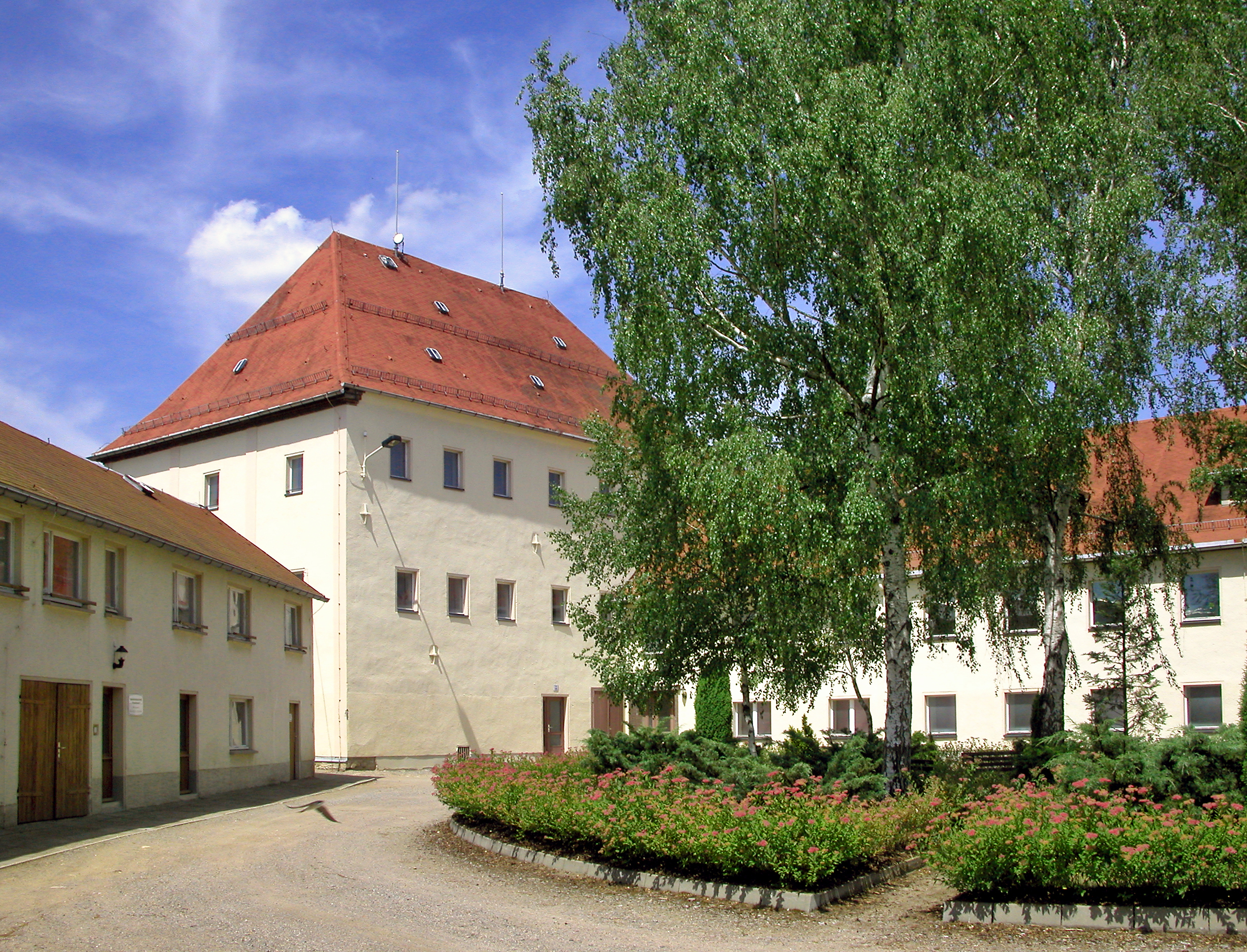 22.06.2008 09627 Hilbersdorf (Bobritzsch-Hilbersdorf), Bahnhofstraße 4 (GMP: 50.911971,13.386201): Herrenhaus "Hoher Hof". Zusammen mit Neubauten als Altenpflegeheim genutzt. Sicht von Südosten. [DSCN33209.TIF]20080622205DR.JPG(c)Blobelt